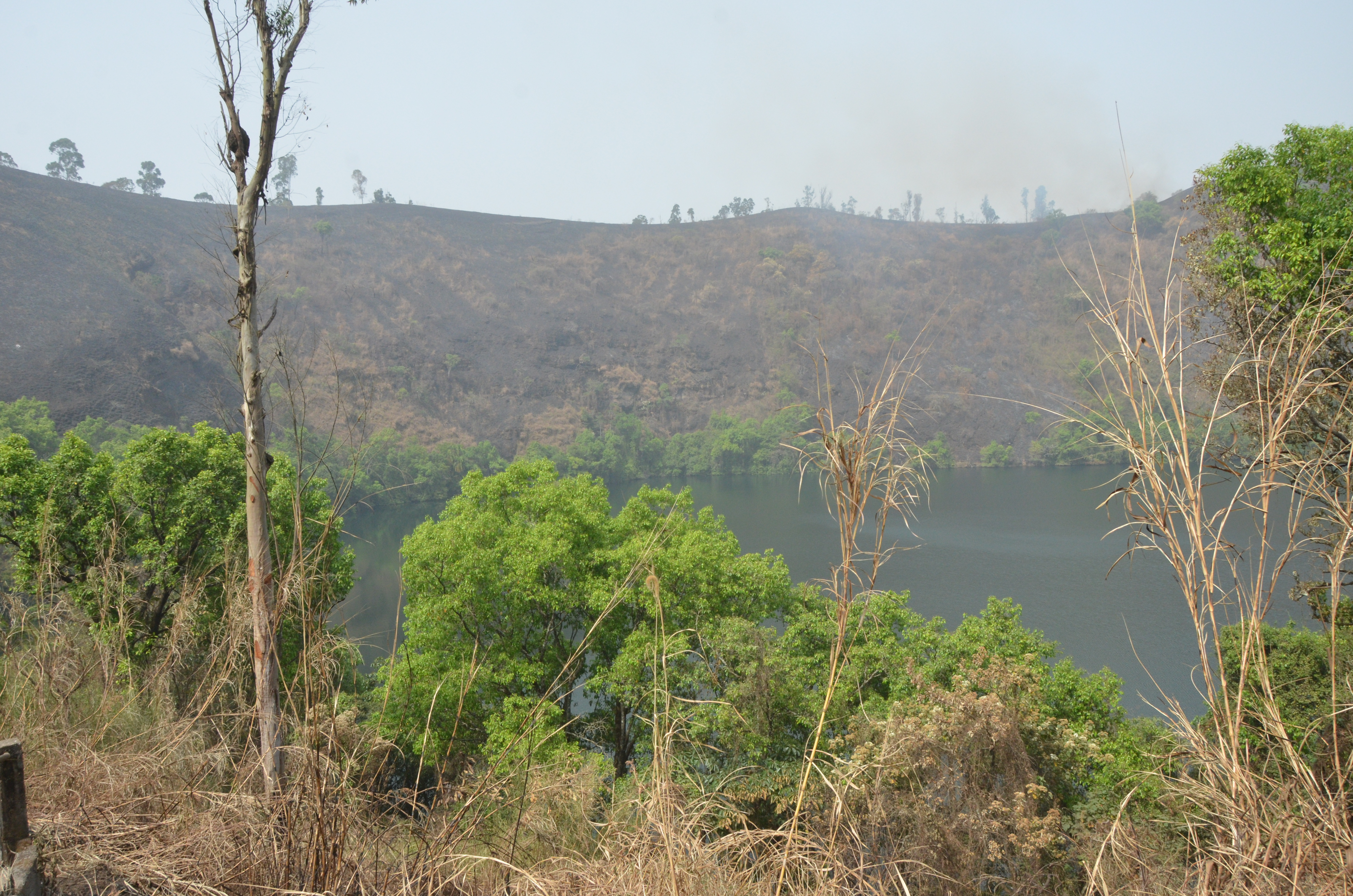 Le lac Baleng situé dans la chefferie Baleng; à l'Ouest du Cameroun